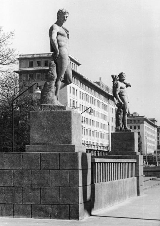 Zentralbild Weiß 13.4.1953 Die erste sozialistische Straße Berlins UBz: Blick von der Deutschen Sporthalle, Berlin, auf Block C-Nord.